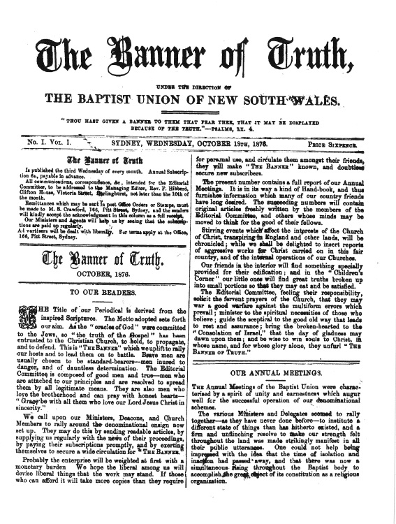 Baptis journal from Australia